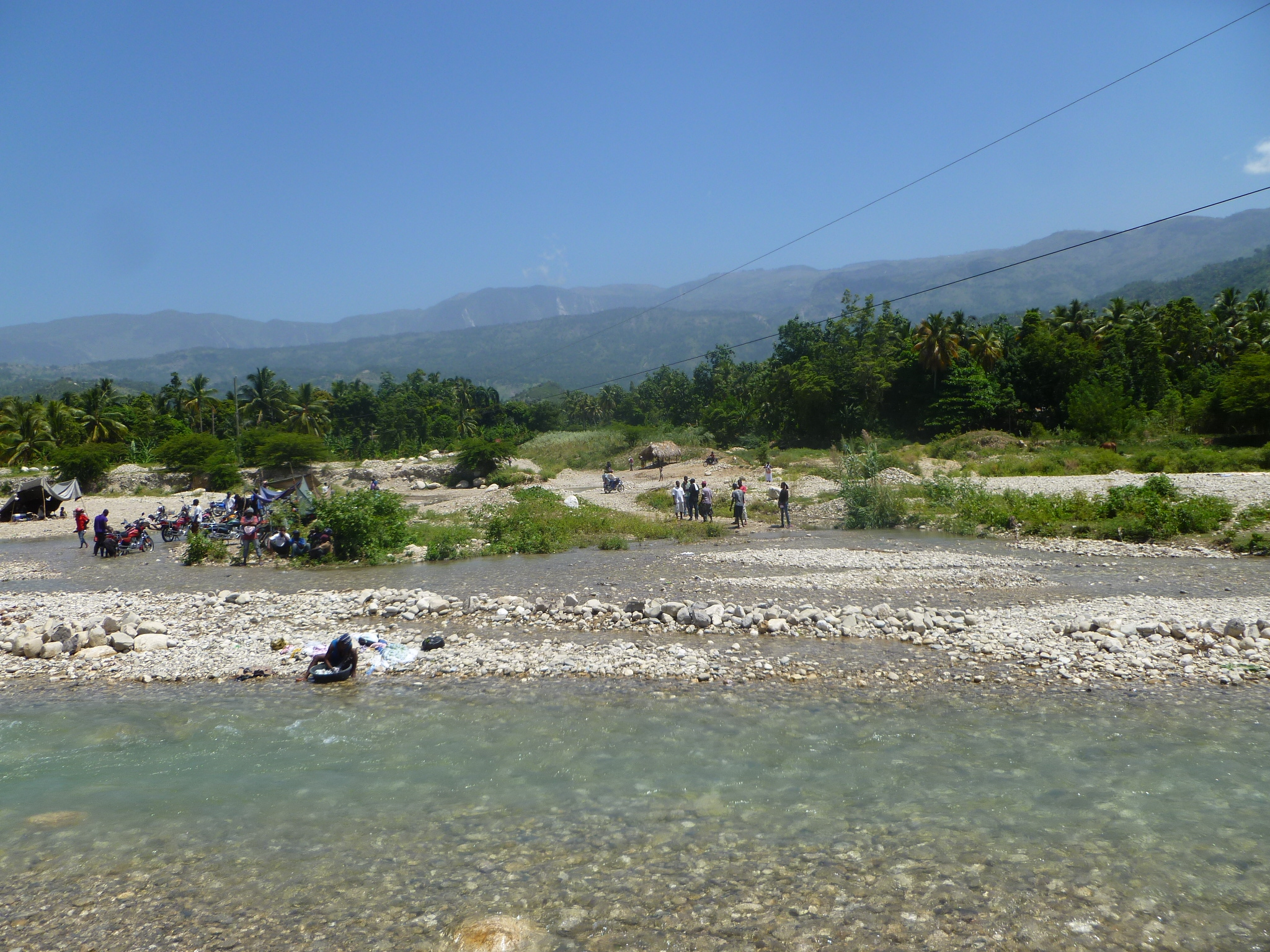 Peredo, Marigot